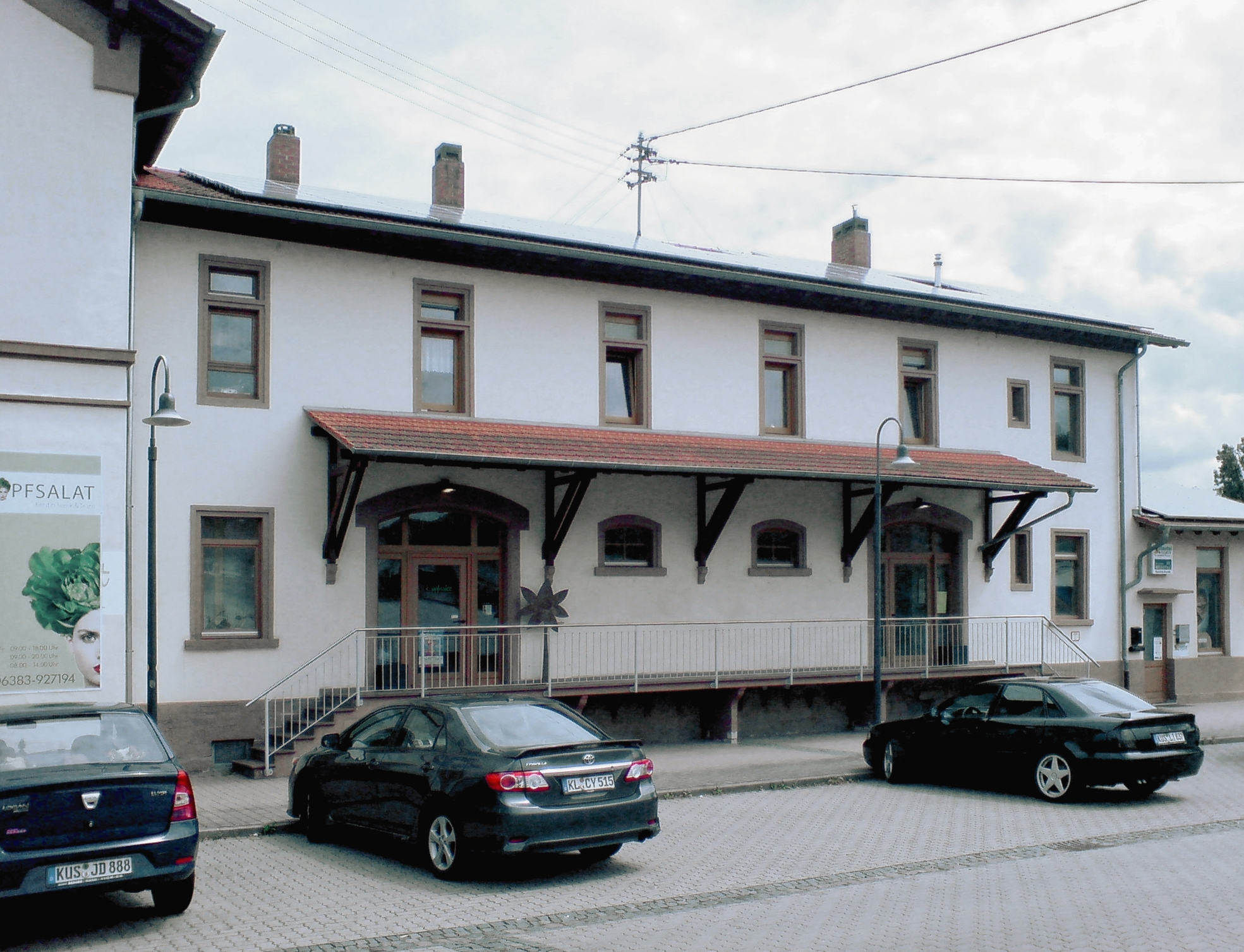 Nebengebäude Bahnhof Glan-Münchweiler